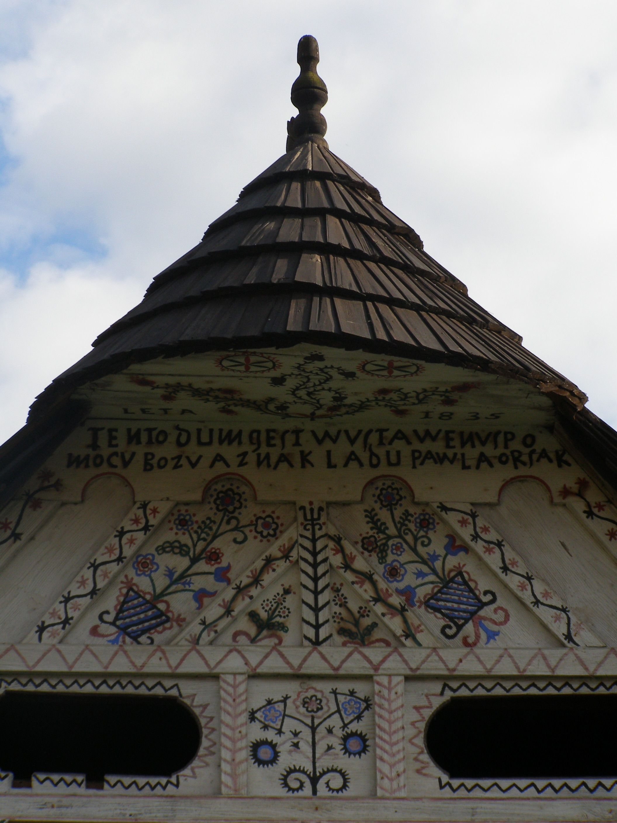 Venkovská usedlost - pam. nár. umělce A. Strnadla (Nový Hrozenkov), Nový Hrozenkov 451